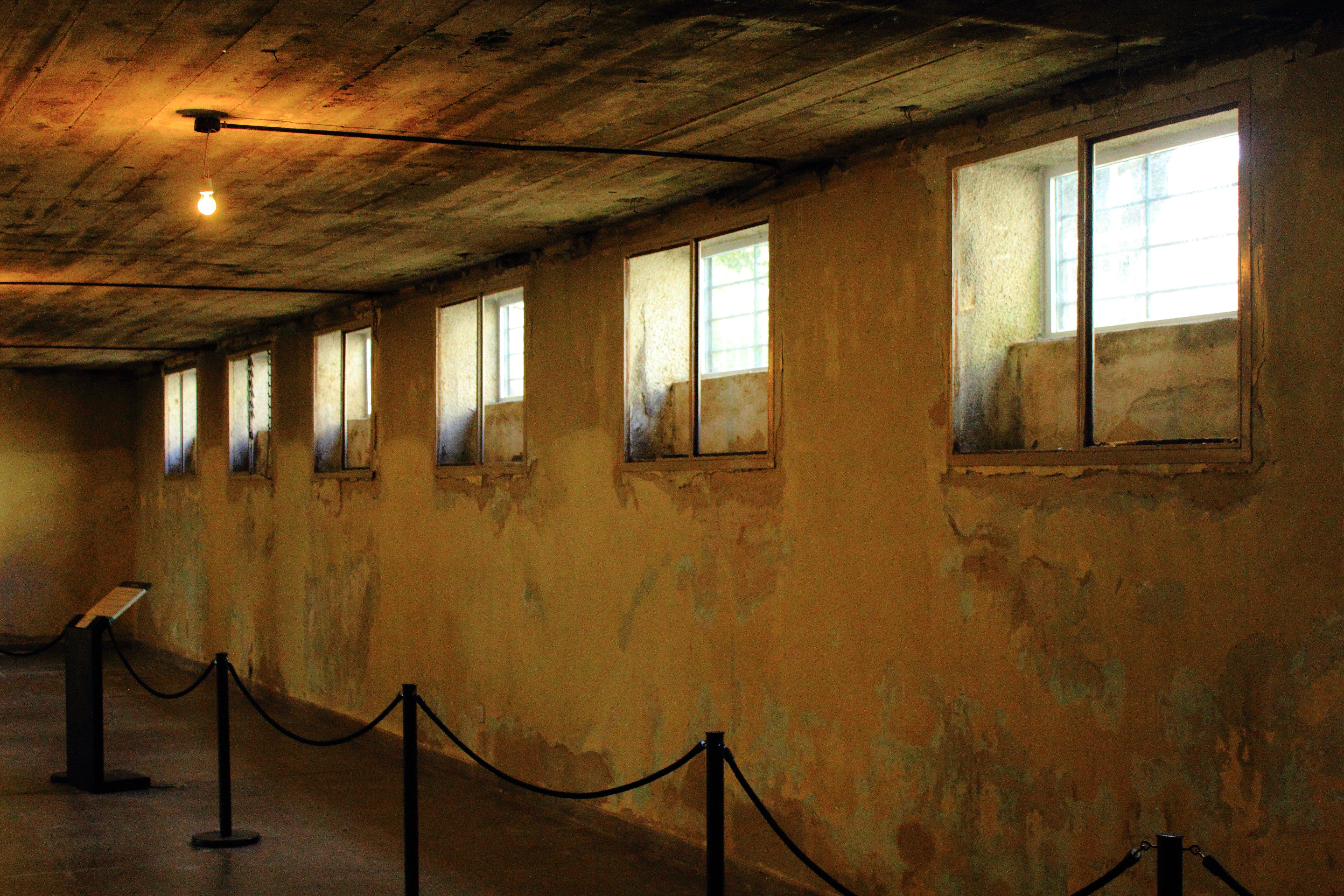 Sótano del "Casino de Oficiales" de la Escuela de Mecánica de la Armada. Allí funcionaba un Centro Clandestino de Detención de Personas